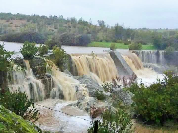 La Toma (2)